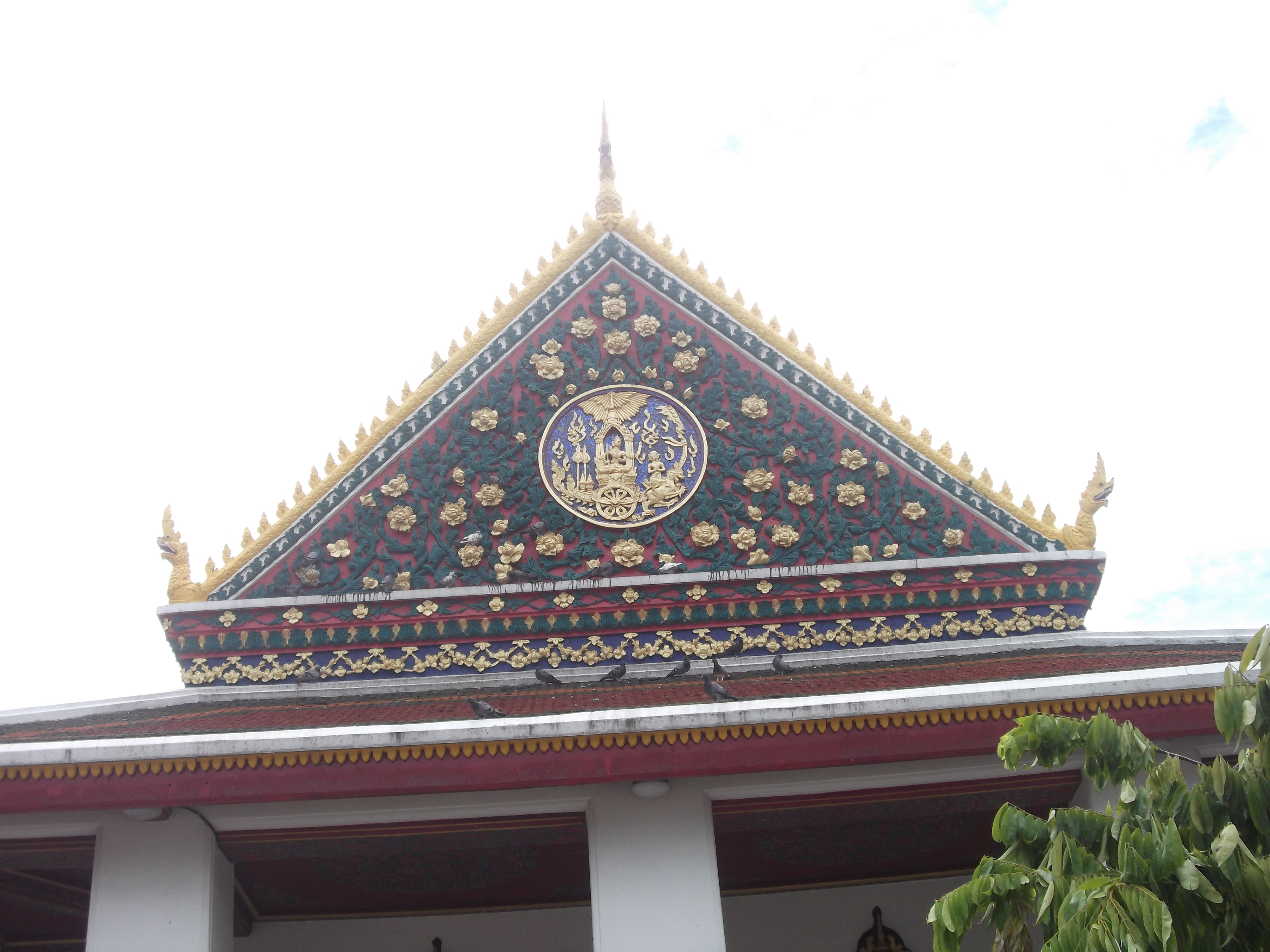 วัดบุปผาราม